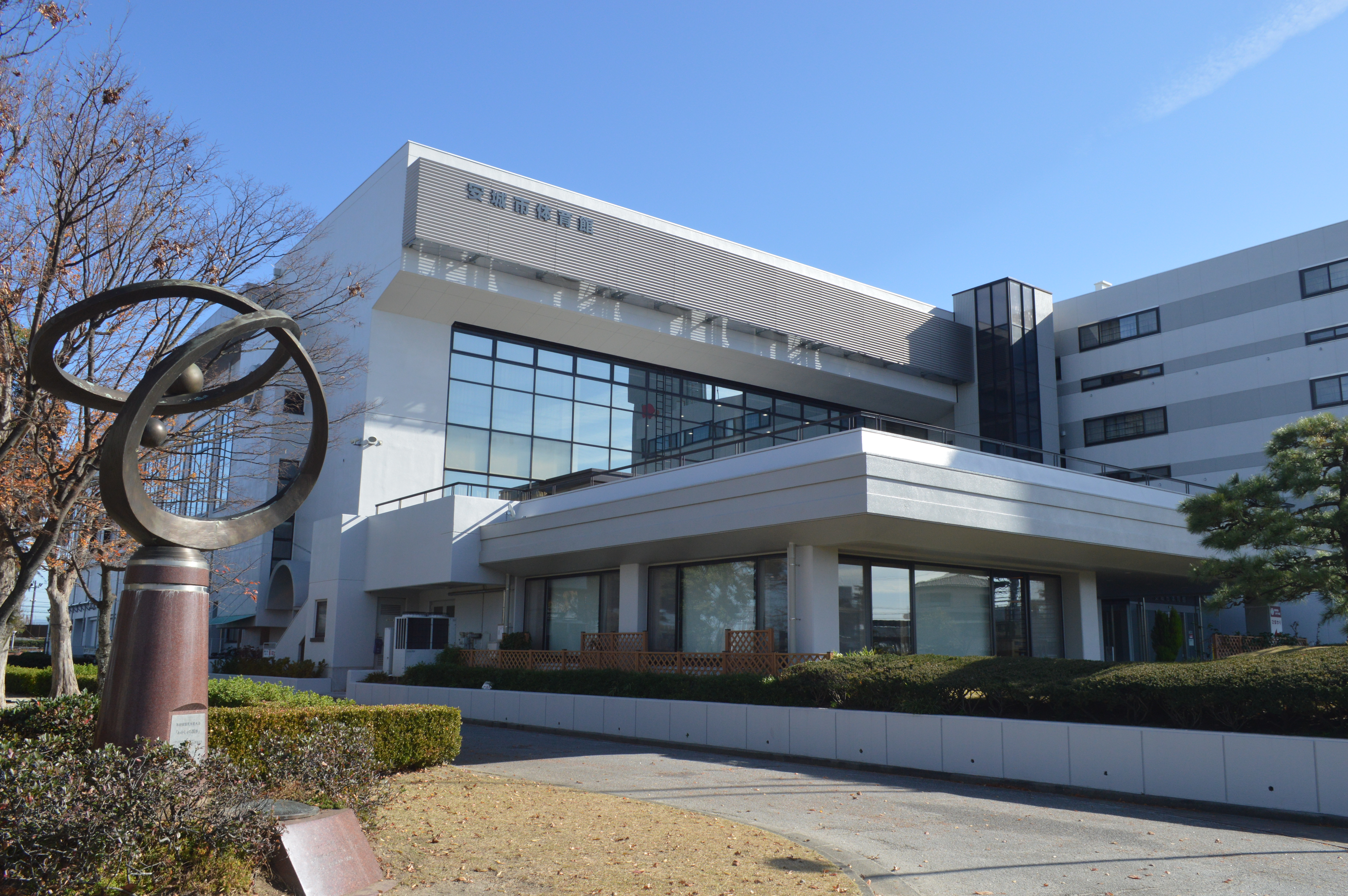 愛知県安城市の安城市総合運動公園にある安城市体育館。